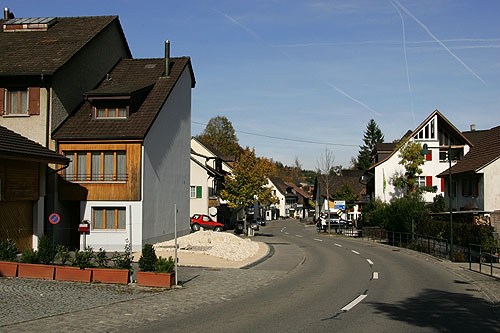 Bretzwil